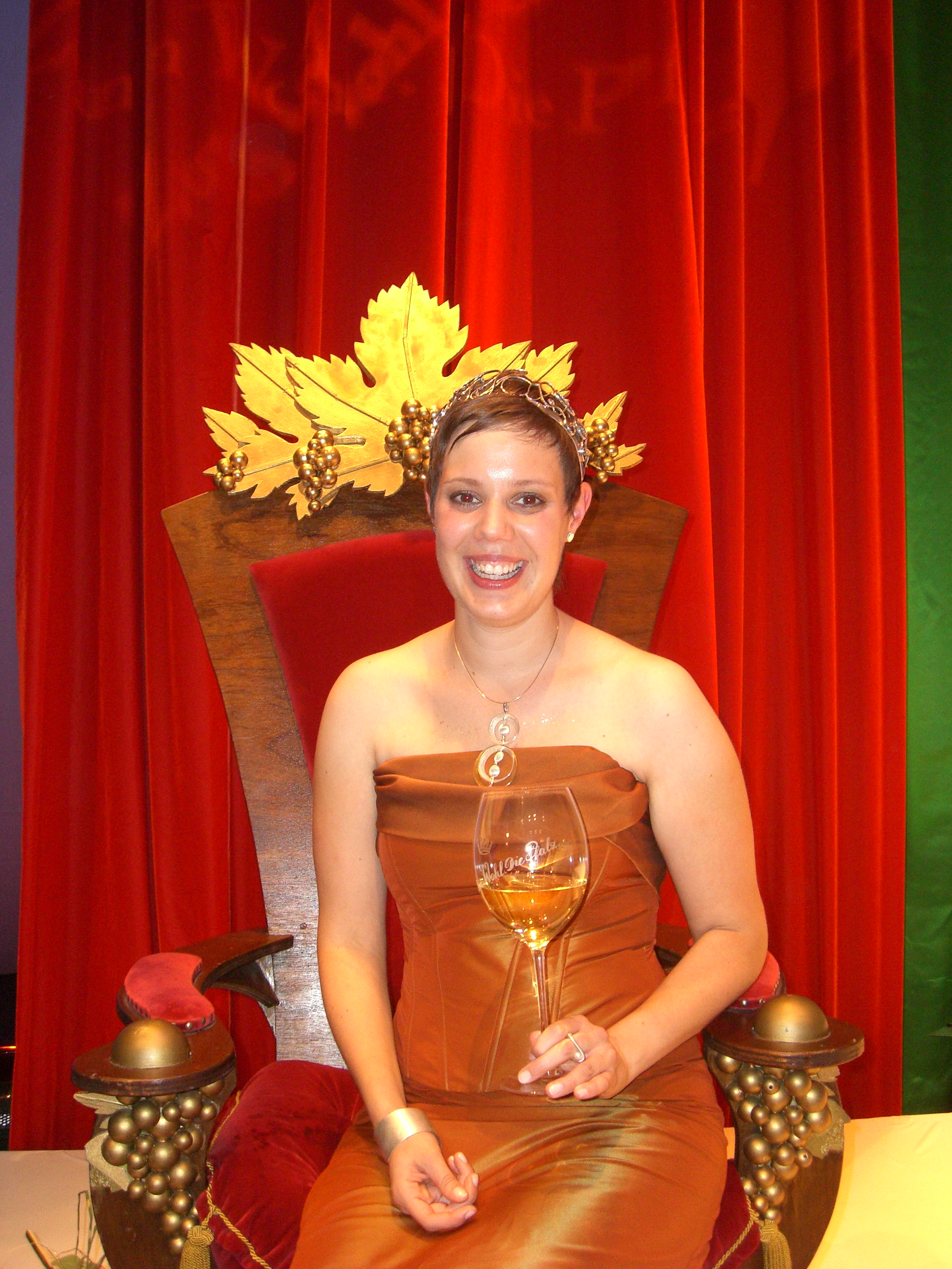 Julia Becker, Pfälzische Weinkönigin 2007/08 einige Momente nach ihrer Krönung im Saalbau (Neustadt/Weinstraße)